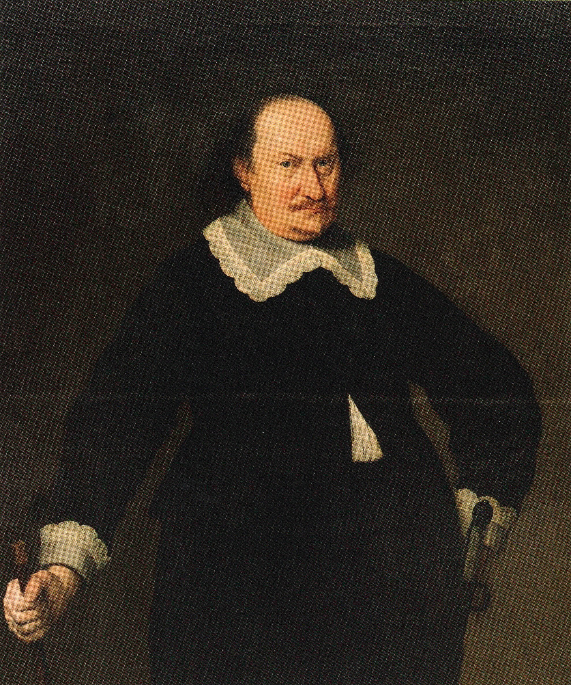 Ölgemälde von Herzog Adolf Friedrich I. von Mecklenburg-Schwerin (1588-1658)